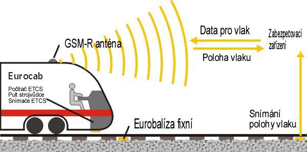 Princip funkce ETCS L2. Z německé Wikipedie upravil PetrS. Zeichnung erstellt 10/2003 von Benutzer:Sansculotte. Bild ist unter der GNU FDL zur weiteren Verwendung freigegeben. Quellenangabe und Beleg an erbeten.